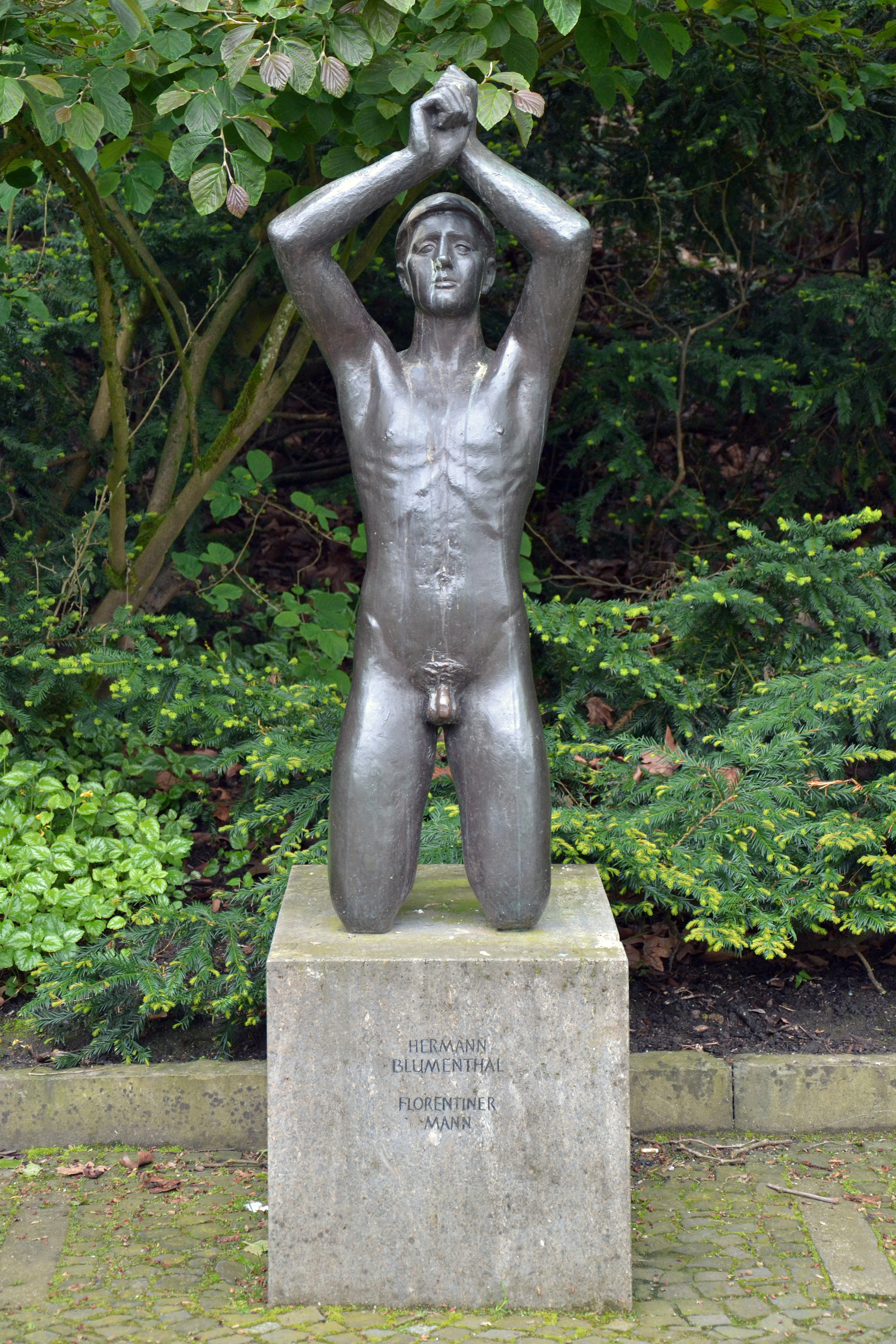 Skulptur im Grugapark Essen: Hermann Blumenthal, Florentiner Mann 1937